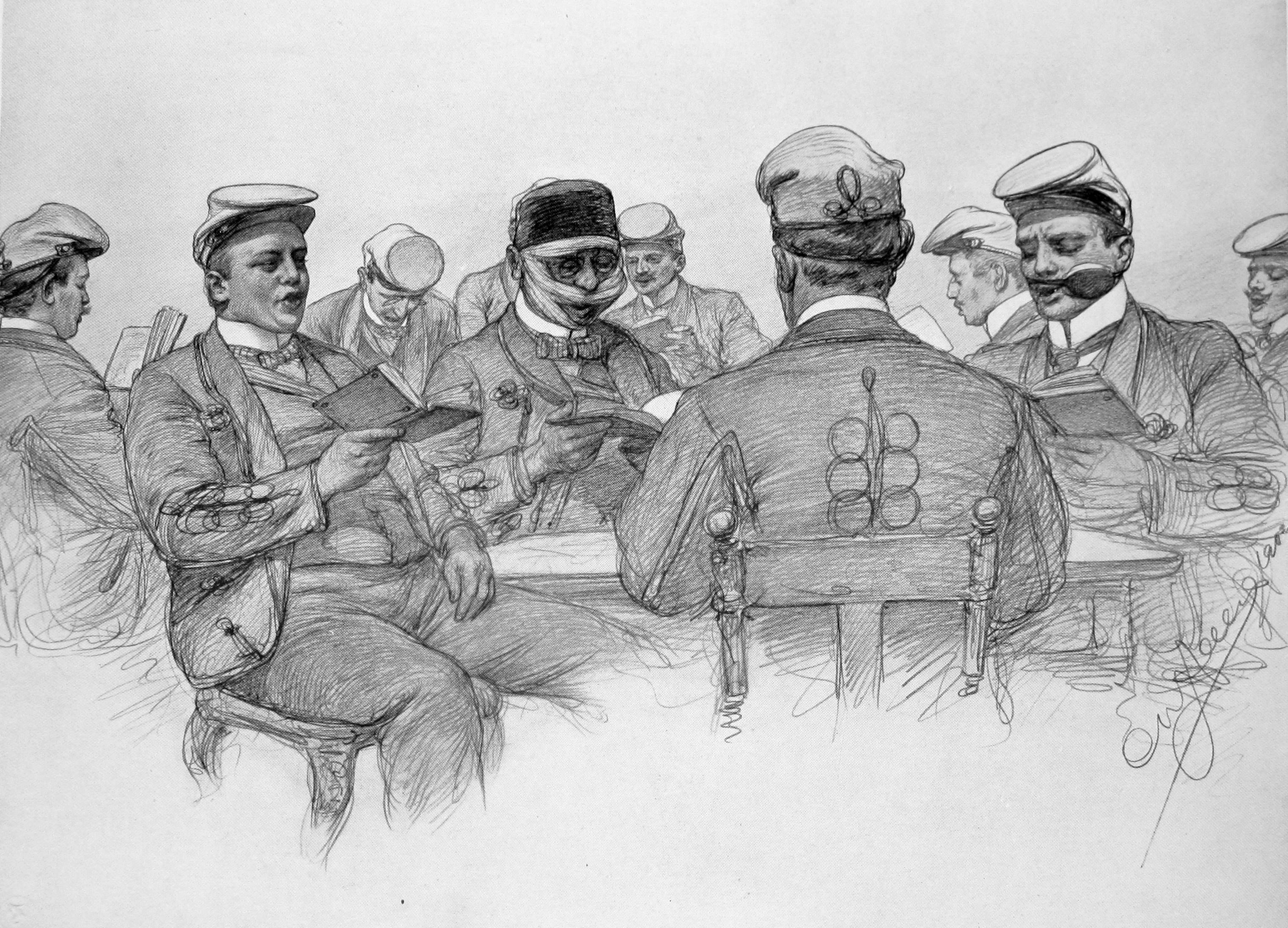 Christian Wilhelm Allers, "Beim Gesang". Zur Identifizierung der abgebildeten Personen siehe Nachdruck des Corpsleben von Hans-Reinhard Koch von 2016 (ISBN 978-3-9815935-4-9) Seite 103f.